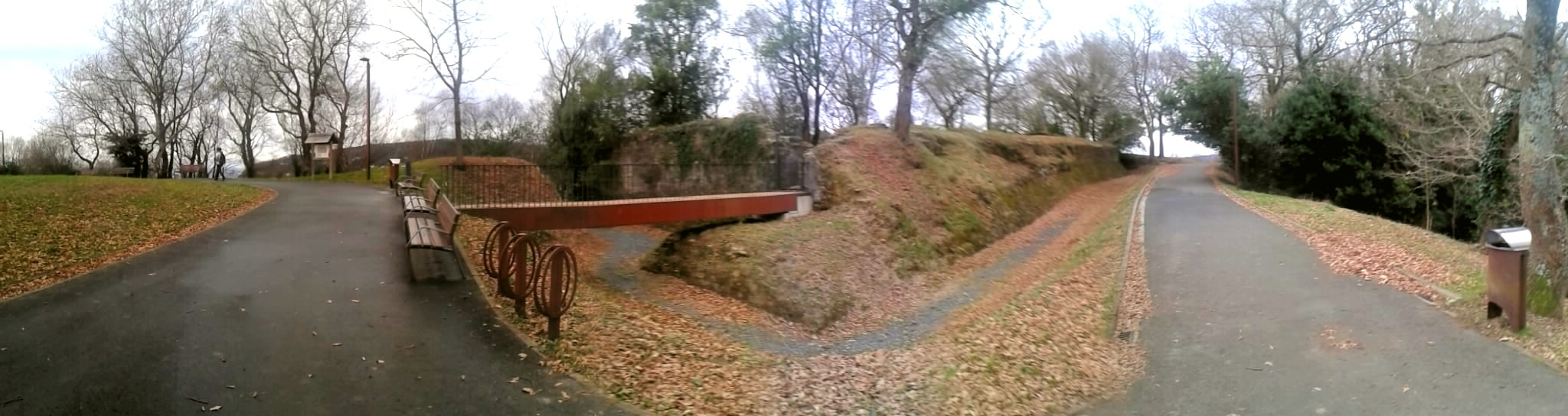 Ametzagainako Gotorlekua Donostian